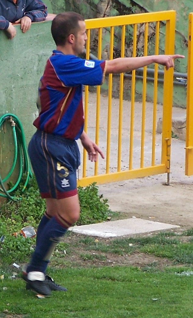 El jugador granota Carlos Alejandro Sierra Fumero, "Sandro"